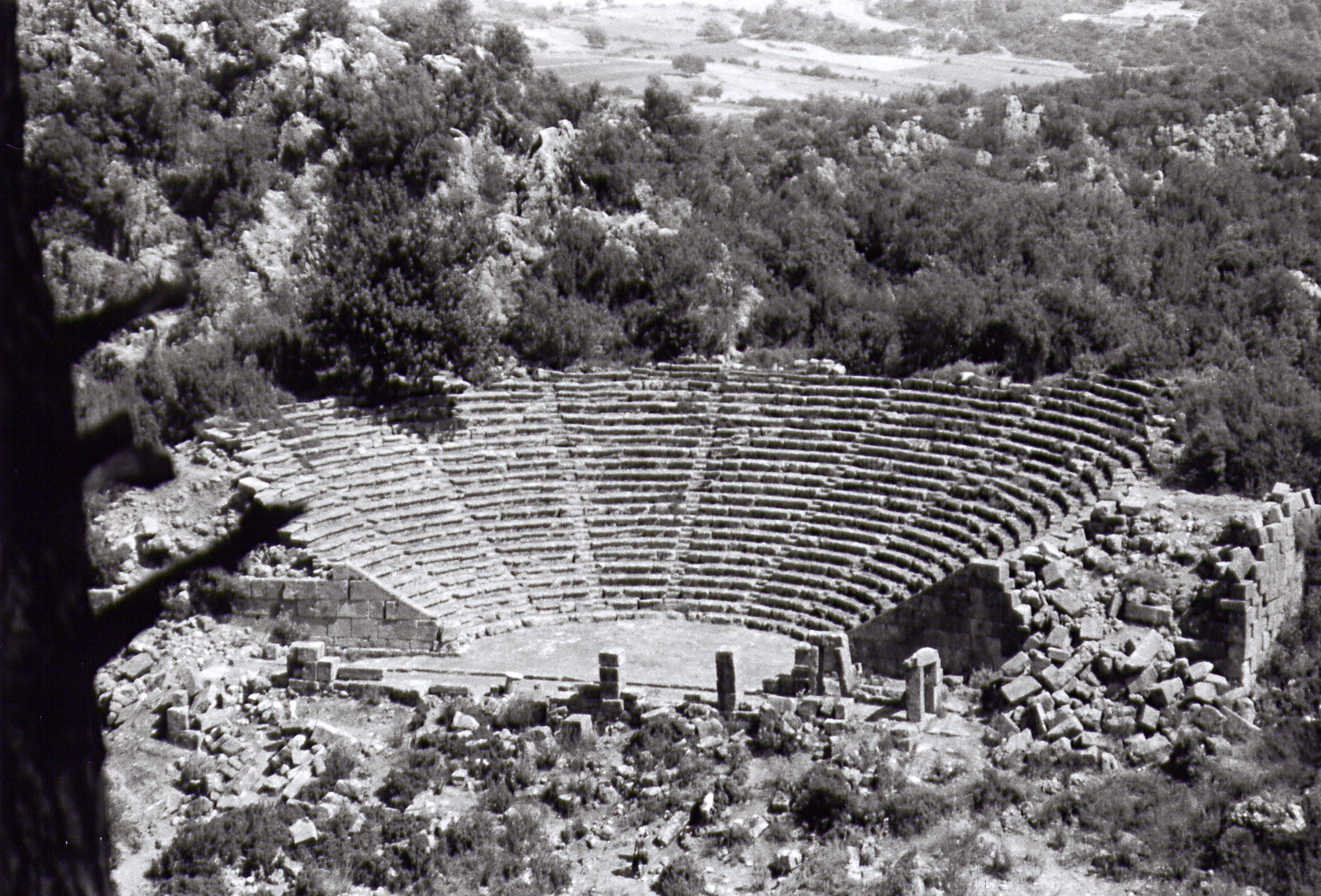 Pinara, Südwesttürkei, Theater